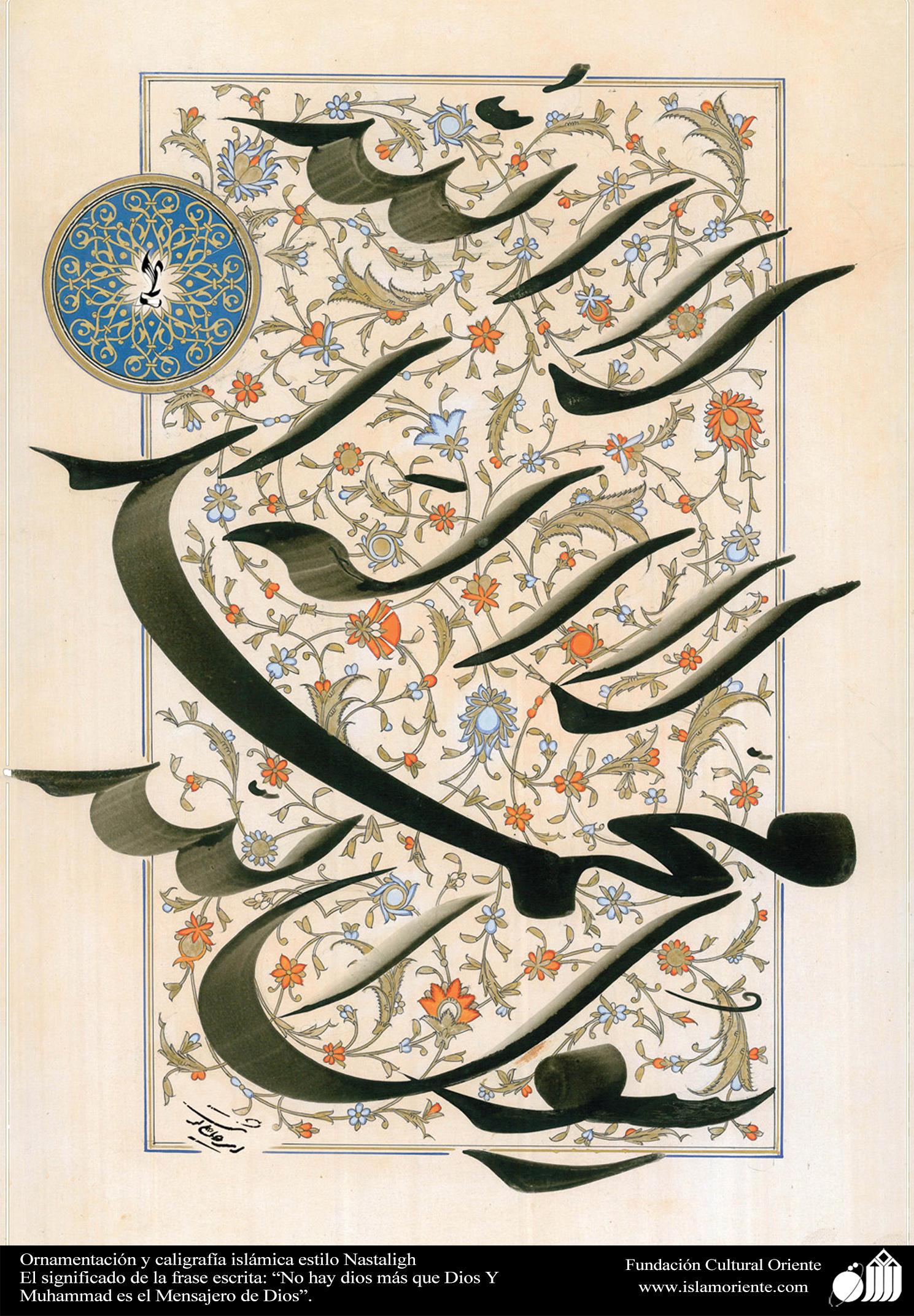 Caligrafía islámica - estilo “Nastaligh”Caligrafía del Corán